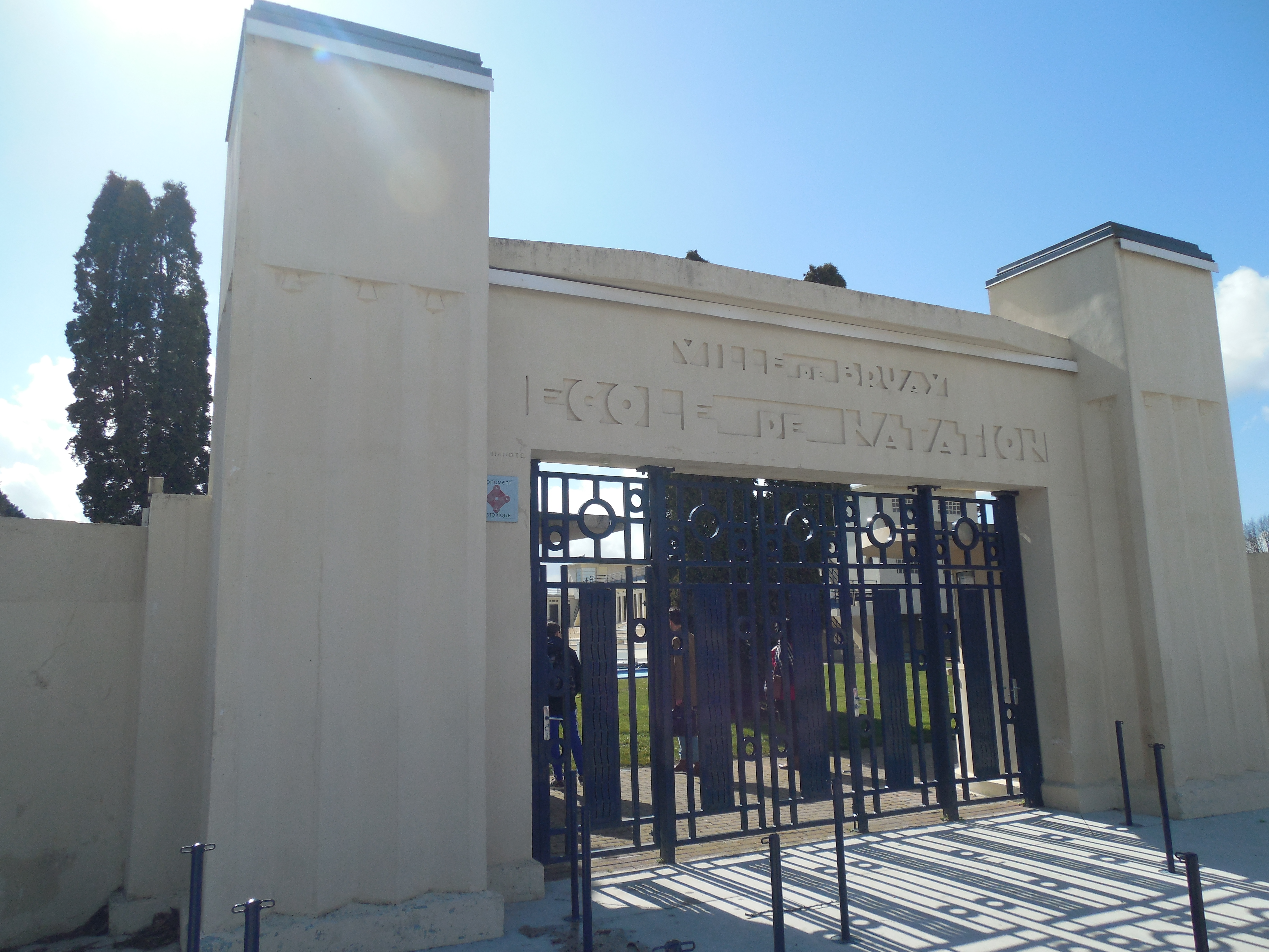 Entrée monumentale de la piscine avec grille en fer forgé bleu. Symétrie apparente.